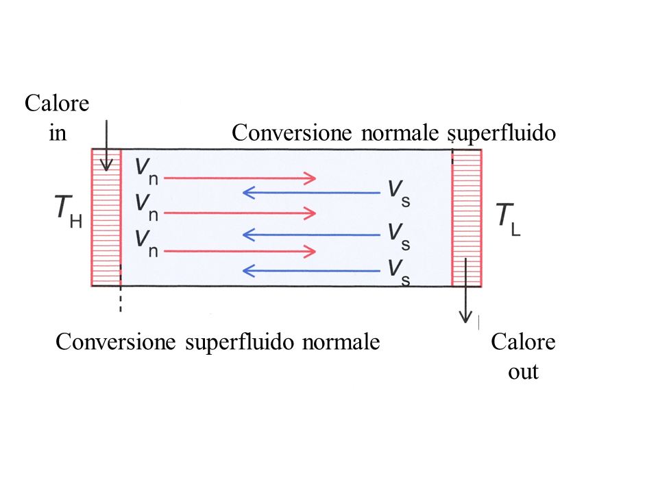 Questa figura ricavata da una simile della wikipedia in inglese serve a descrivere schematicamente come l'elio superfluido venga utilizzato con successo per sottrarre calore